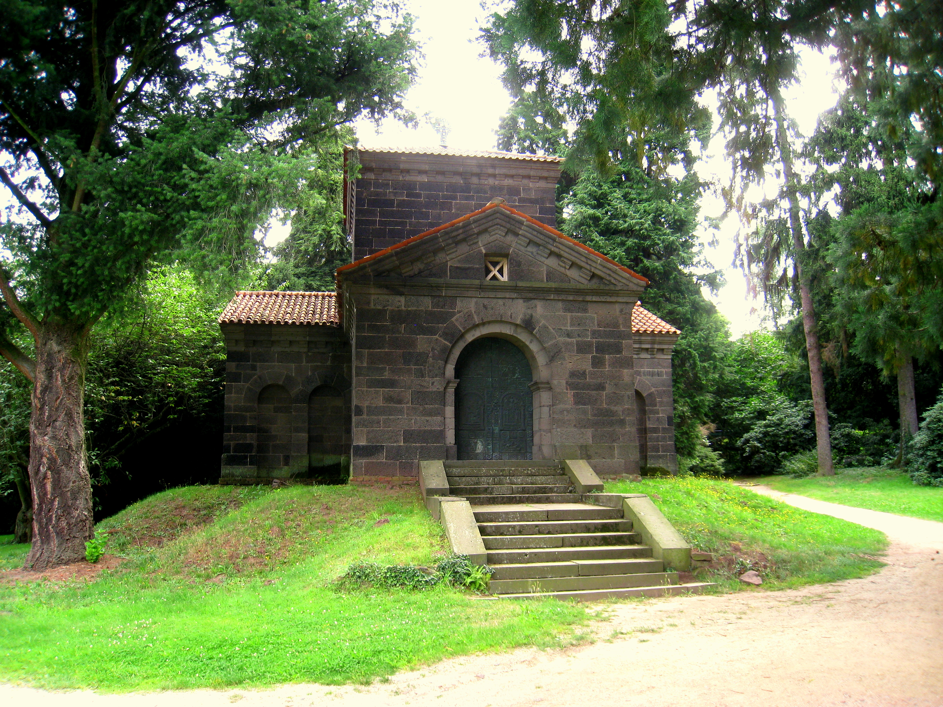 New Mausoleum in Rosenhöhe park, Darmstadt, Germany.